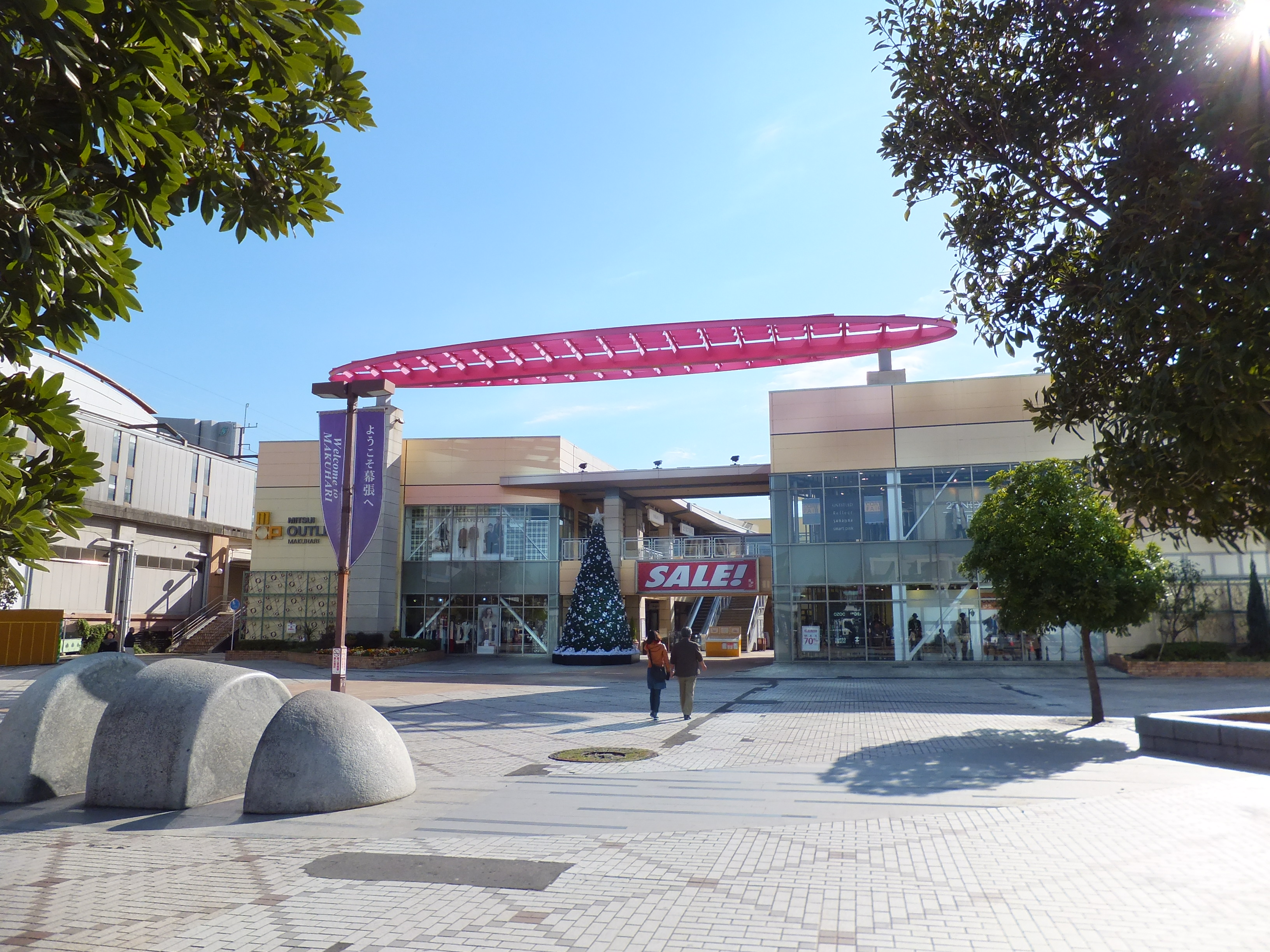 三井アウトレットパーク 幕張